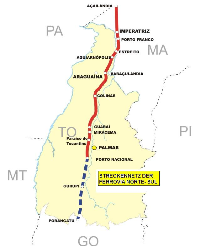 Steckenplan der Bahngesellschaft Ferrovia Norte - Sul S.A.